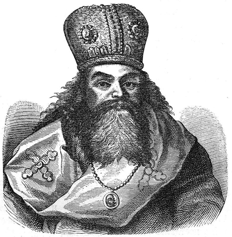 Архиепископ Феофан (в миру – Елеазар Прокопович; 1681-1736) — епископ Православной Российской Церкви, архиепископ Новгородский. Проповедник и государственный деятель, публицист, поэт, сподвижник Петра I. Гравюра на дереве, 18 в.